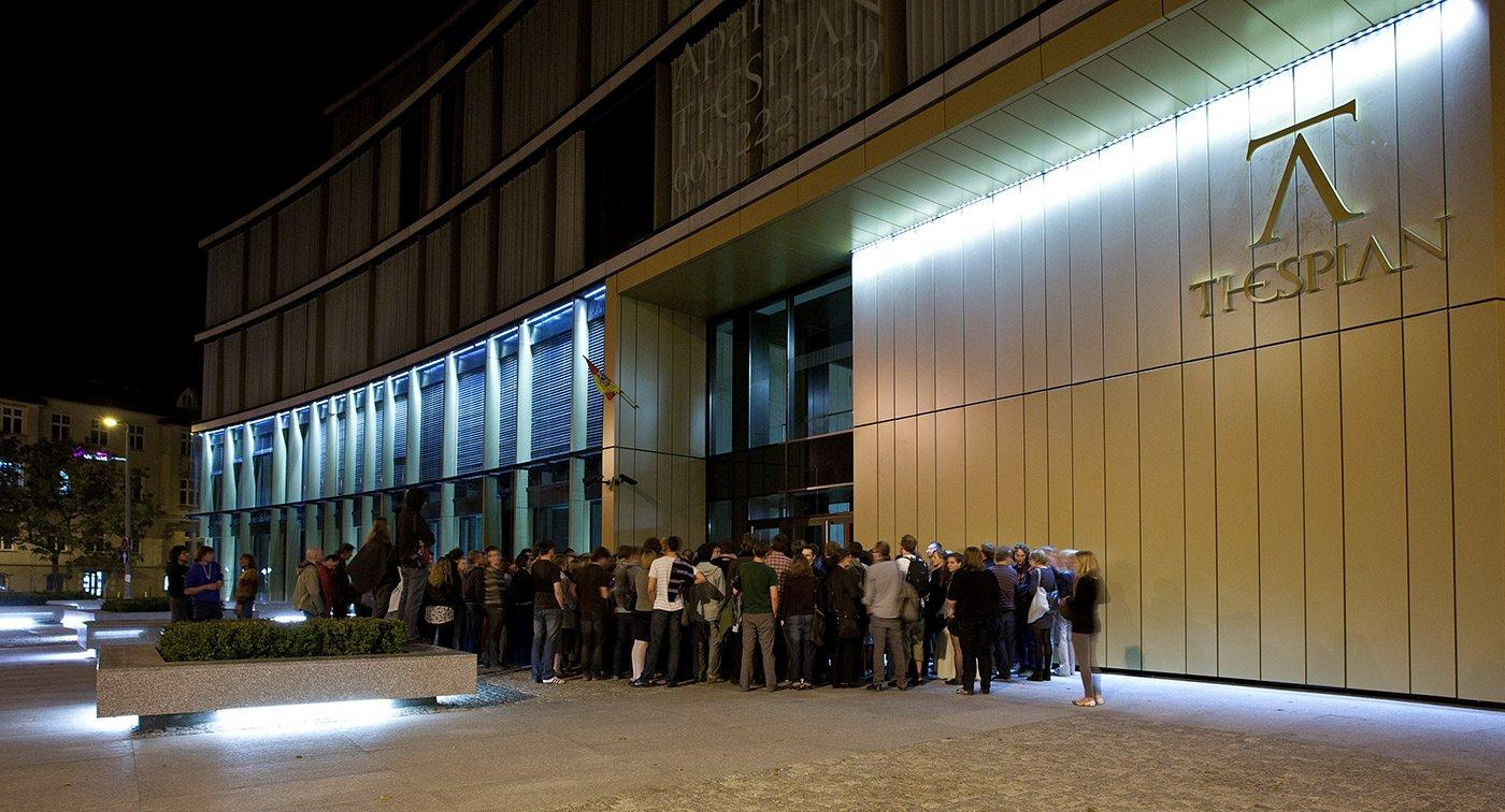 W ramach dolnośląskiego festiwalu architektury wieczorem po wnętrzach budynku oprowadzał i opowiadał jego projektant, arch. Zbigniew Maćków. Chętnych było koło setki. Wszyscy weszli, ale ile trzeba było czekać w ogonie, by wyszli z kadrów:).